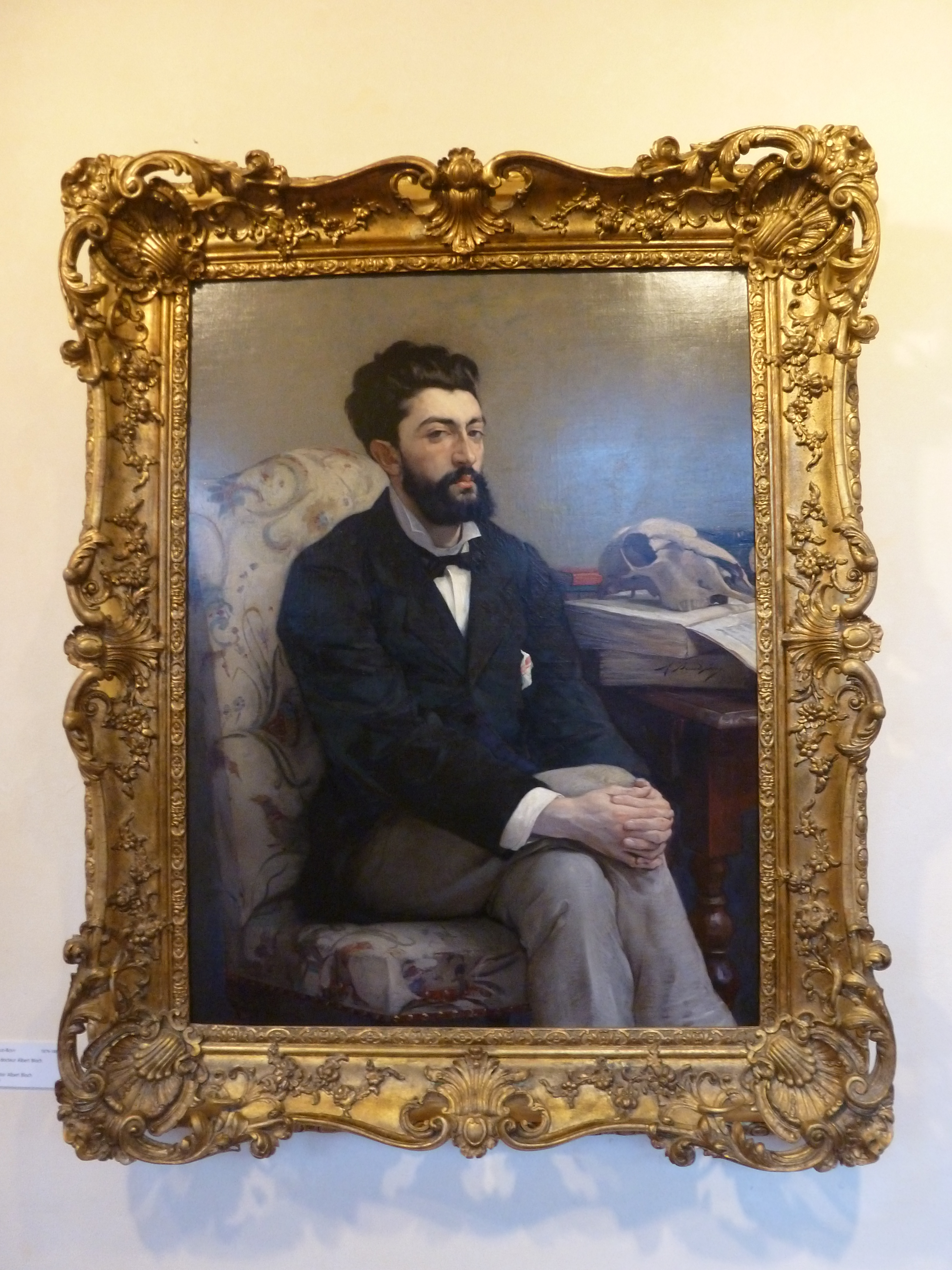 Portrait du docteur Albert Bloch (1879–80)